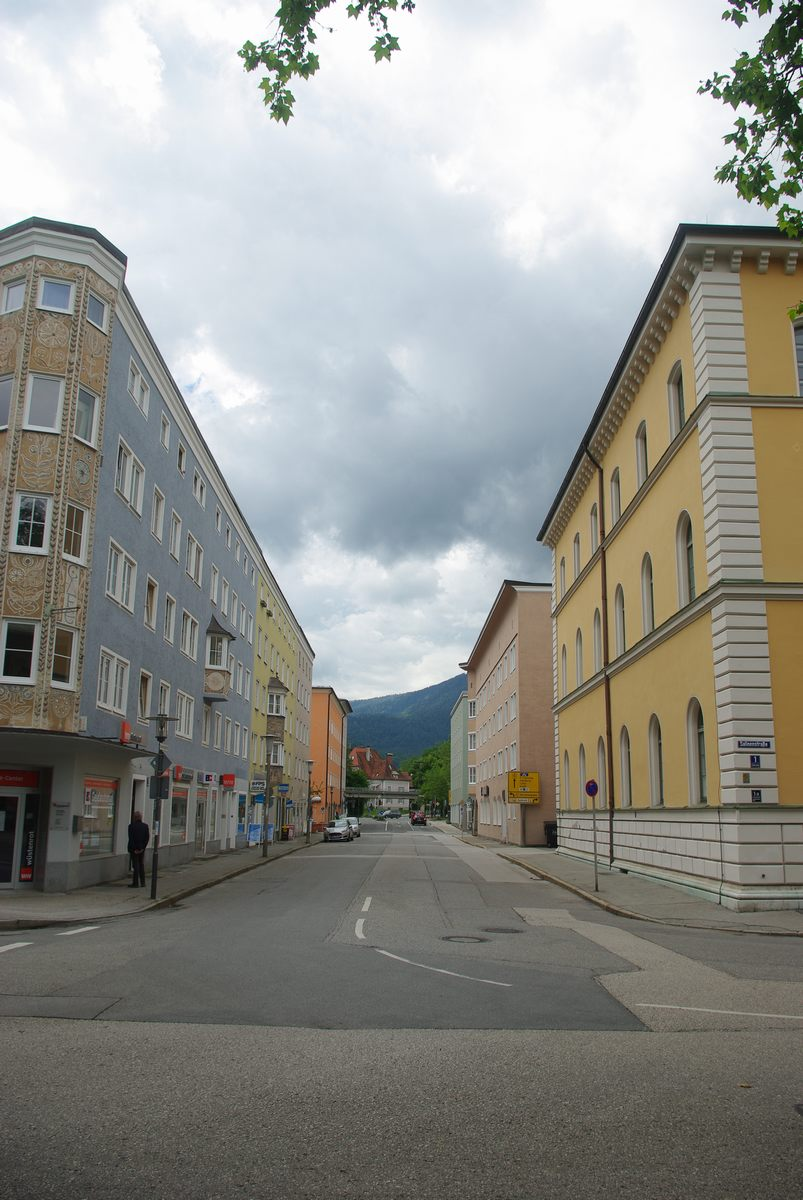 Kammerbotenstraße in 83435 Bad Reichenhall